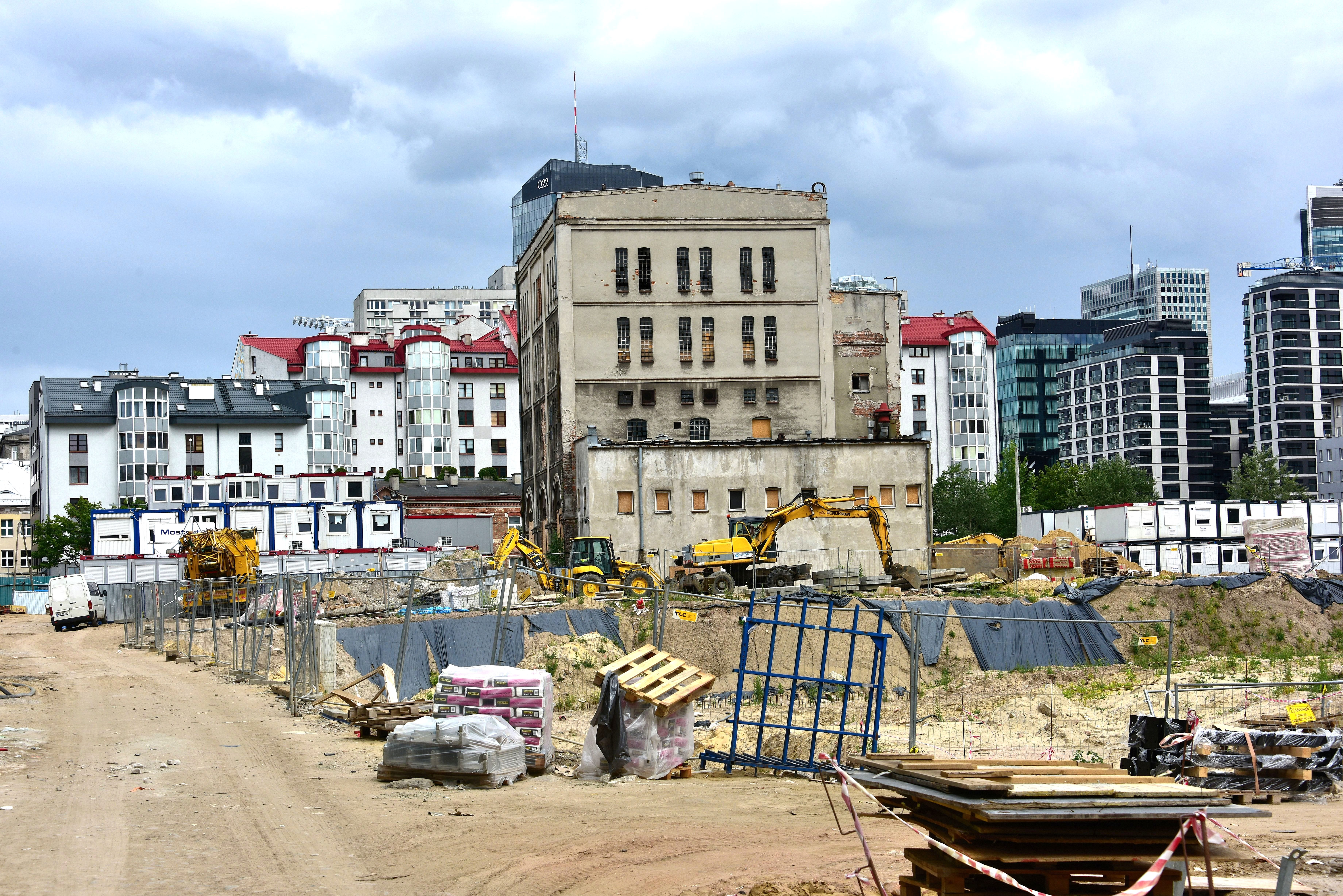 Teren danego browaru Haberbusch i Schiele, widok od strony ul. Wroniej